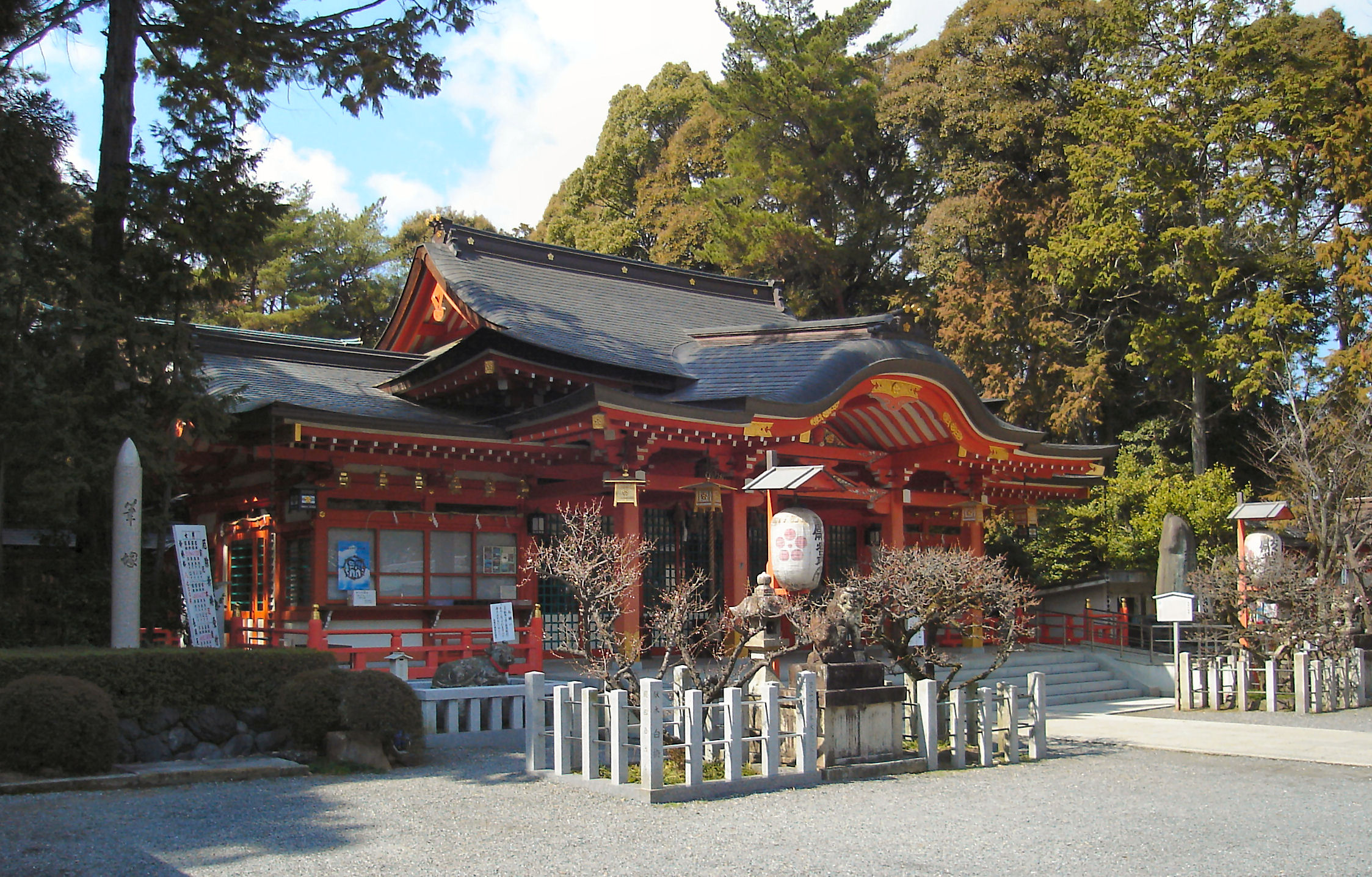 Nagaoka Tenmangu shrine, Kyoto japan